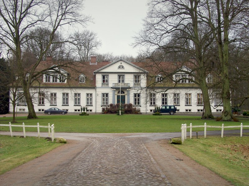 View of Herrenhaus Haseldorf